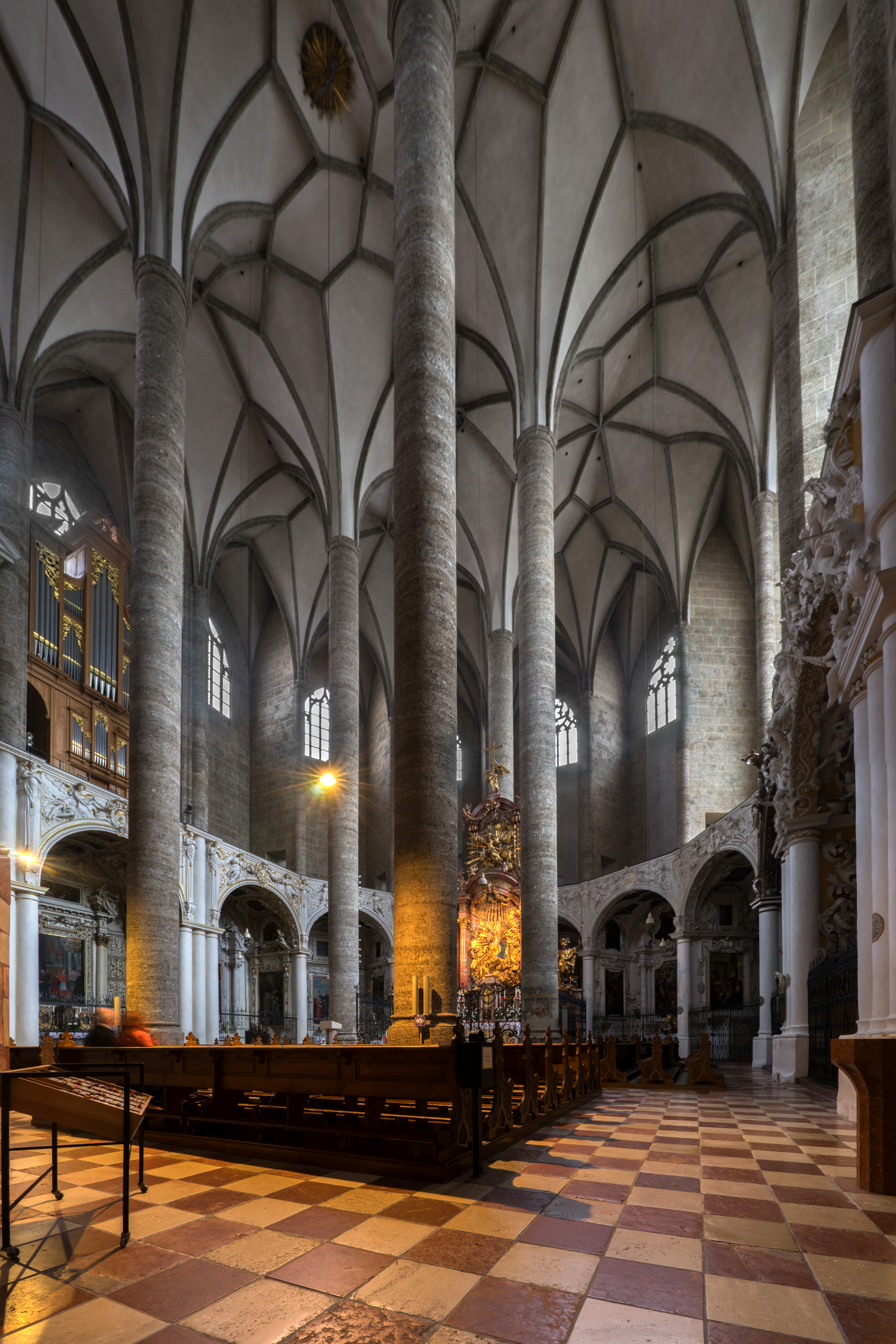 Altarraum, Franziskanerkirche Salzburg